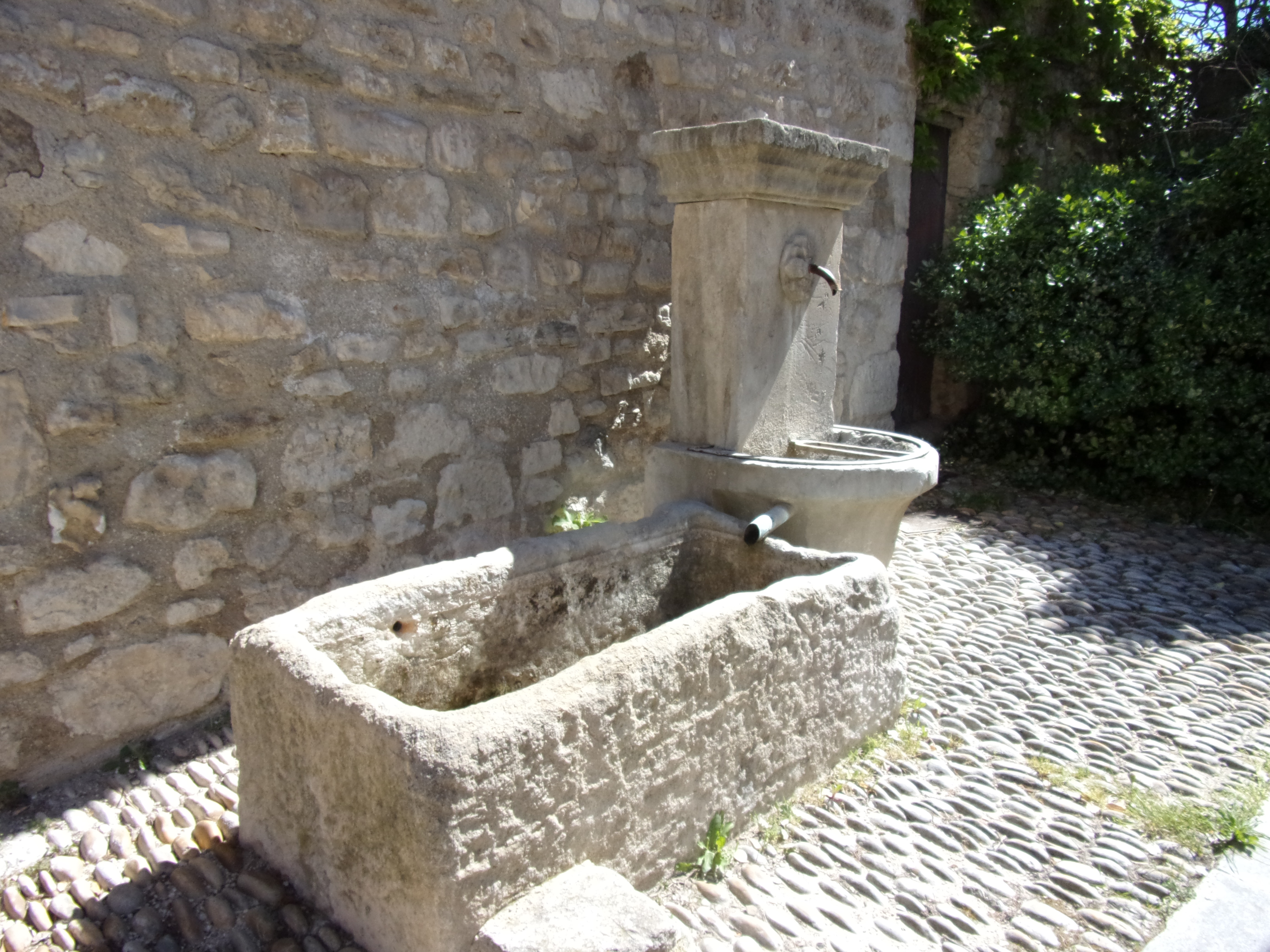 Fontaine du Planet de Guidan